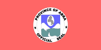 Dit materiaal is afkomstig van of en is door de auteur Jaume Ollé als GFDL beschikbaar gesteld, zie de toestemmingsemail. Hiermee vervallen de strictere voorwaarden in de disclaimers op de genoemde sites.